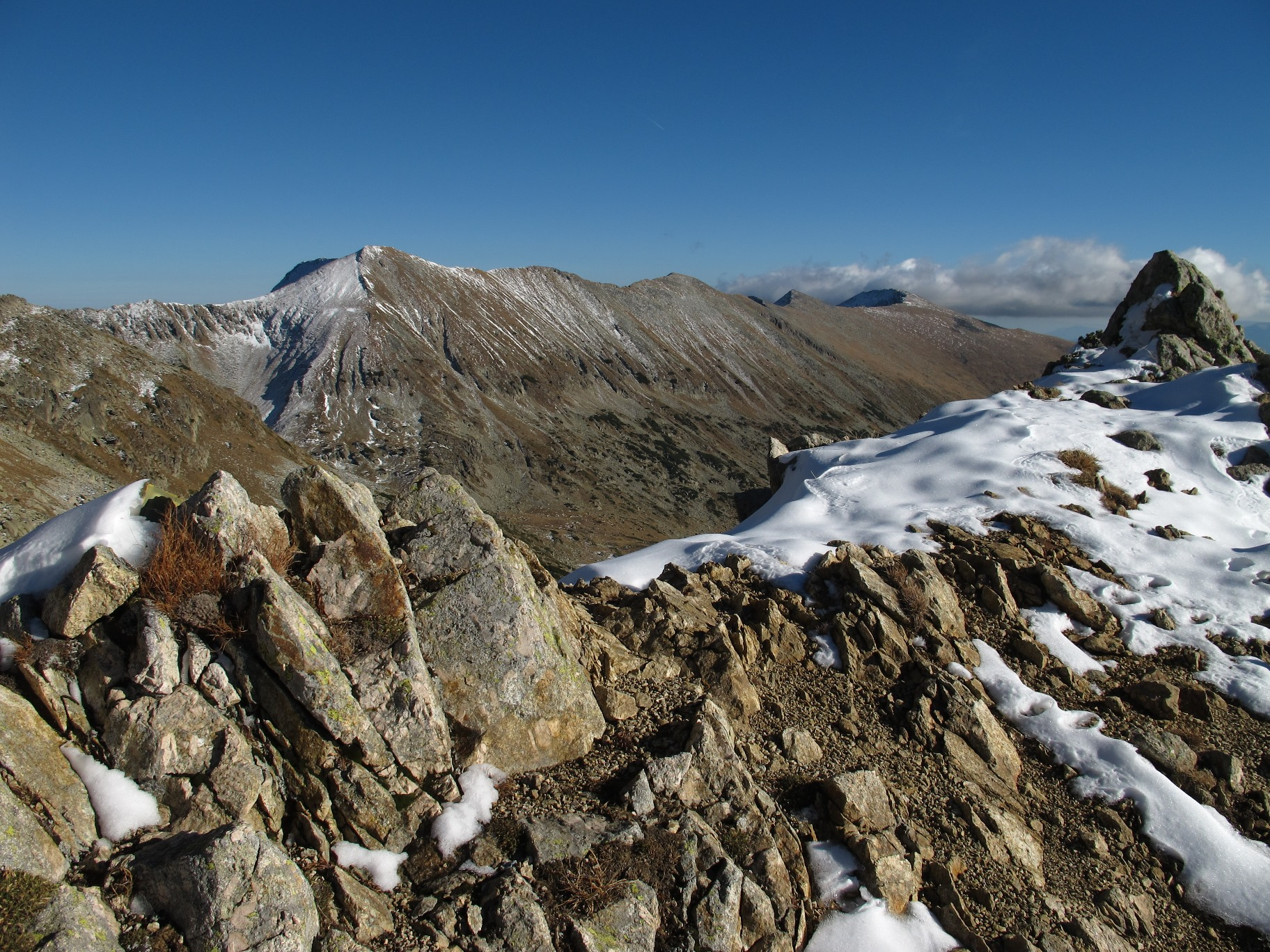 Пирин, Пирин